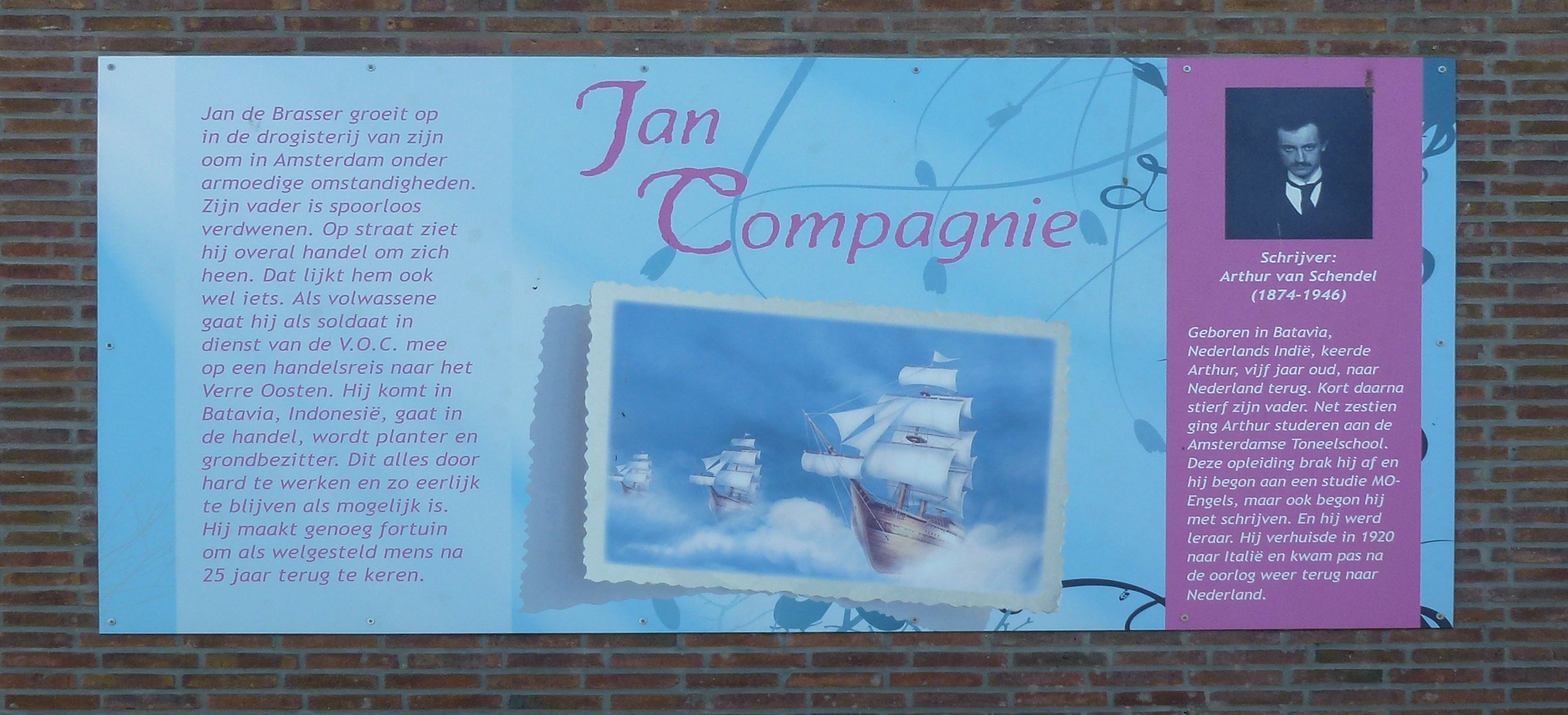 Straatnaam beschrijving. Jan Compagnie (1932) is geschreven door Arthur van Schendel